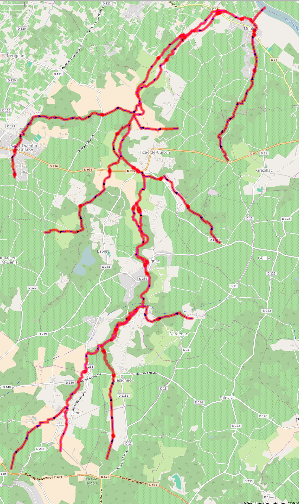 Le Canaudonne (affluents) This map may be incomplete, and may contain errors. Don't rely solely on it for navigation.